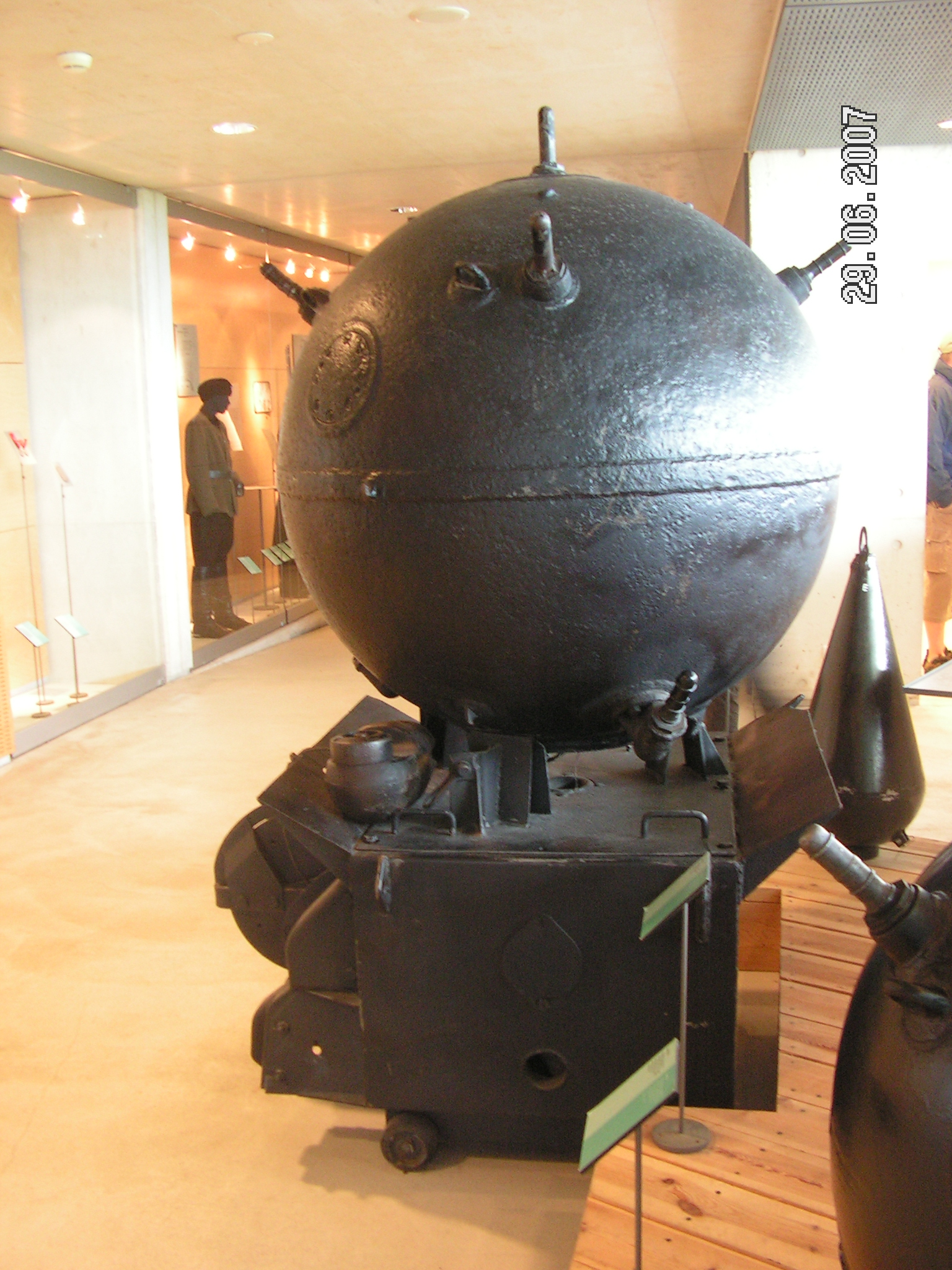 Deutsche Ankertaumine im Bunkermusum Hanstholm